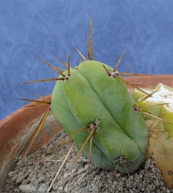 Jeune pousse de trichocereus bridgesii.